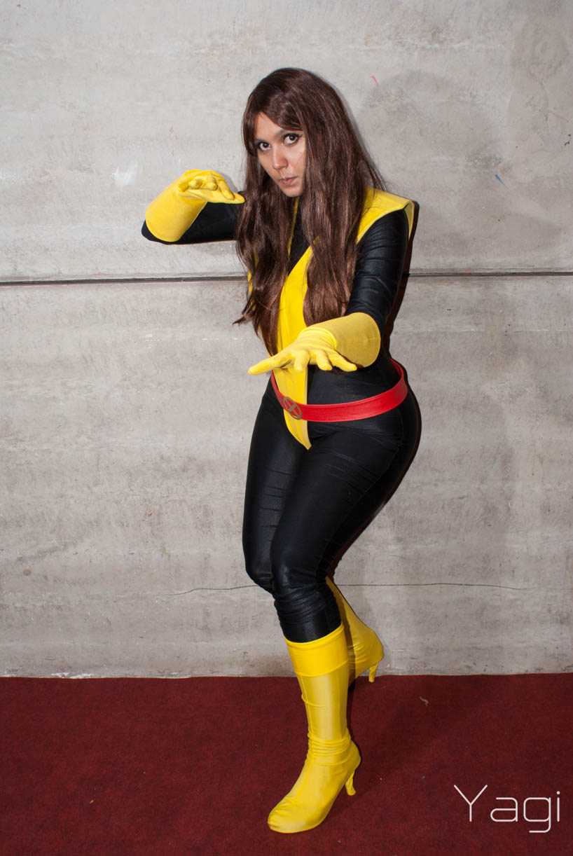 Cosplay da personagem Lince Negra na Comic Con Experience de 2014